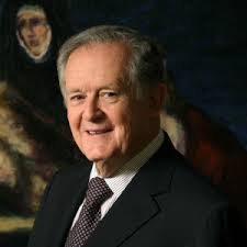 empresario constructor y banquero colombiano